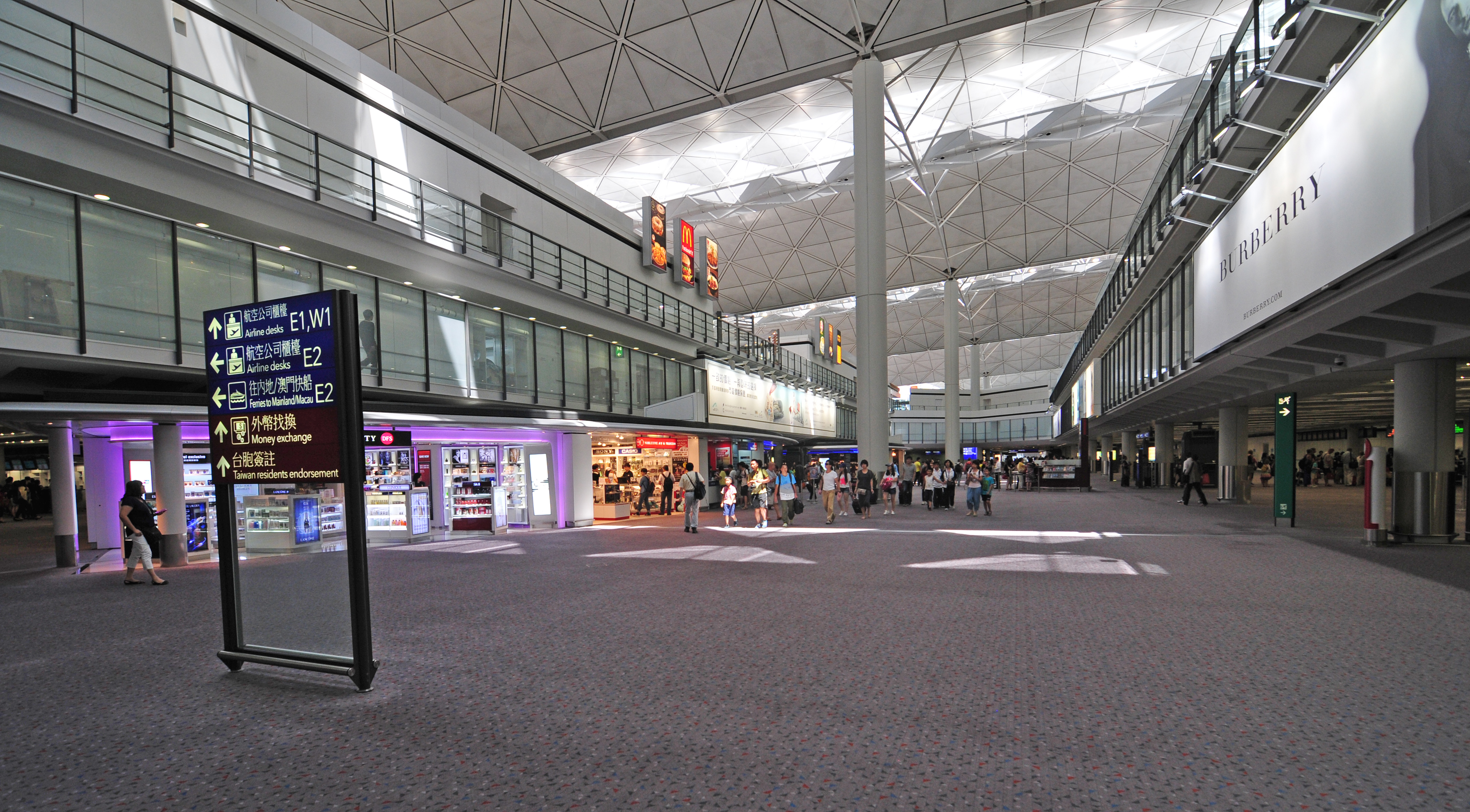 Wikimania 2013 Hongkong